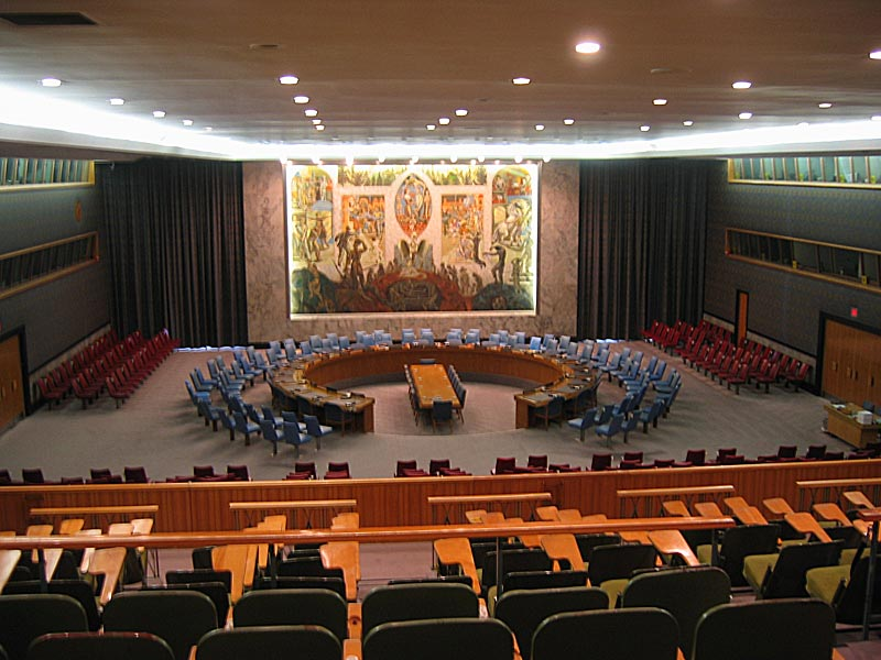 United Nations Security Council, 29 Mai, 2004 (Selbst fotografiert) Die Sitzordnung ist an den Farben der Sitze orientiert: Am Runden Tischen die Delegierten von Mitgliedstaaten des Rates (auf den dunkelgrauen Sitzen) - auf den blauen Stühlen deren Berater. Die roten Sitze sind für andere Mitglieder der UN gedacht, die an einer Sitzung zwar teilnehmen können, aber kein Stimmrecht haben. Die Besuchergalerie wurde 1993 aus sicherheitstechnischen Gründen für Besucher geschlossen. In den Fenstern auf der linken und rechten Seite sitzen Dolmetscher. Benutzer:Majonaise